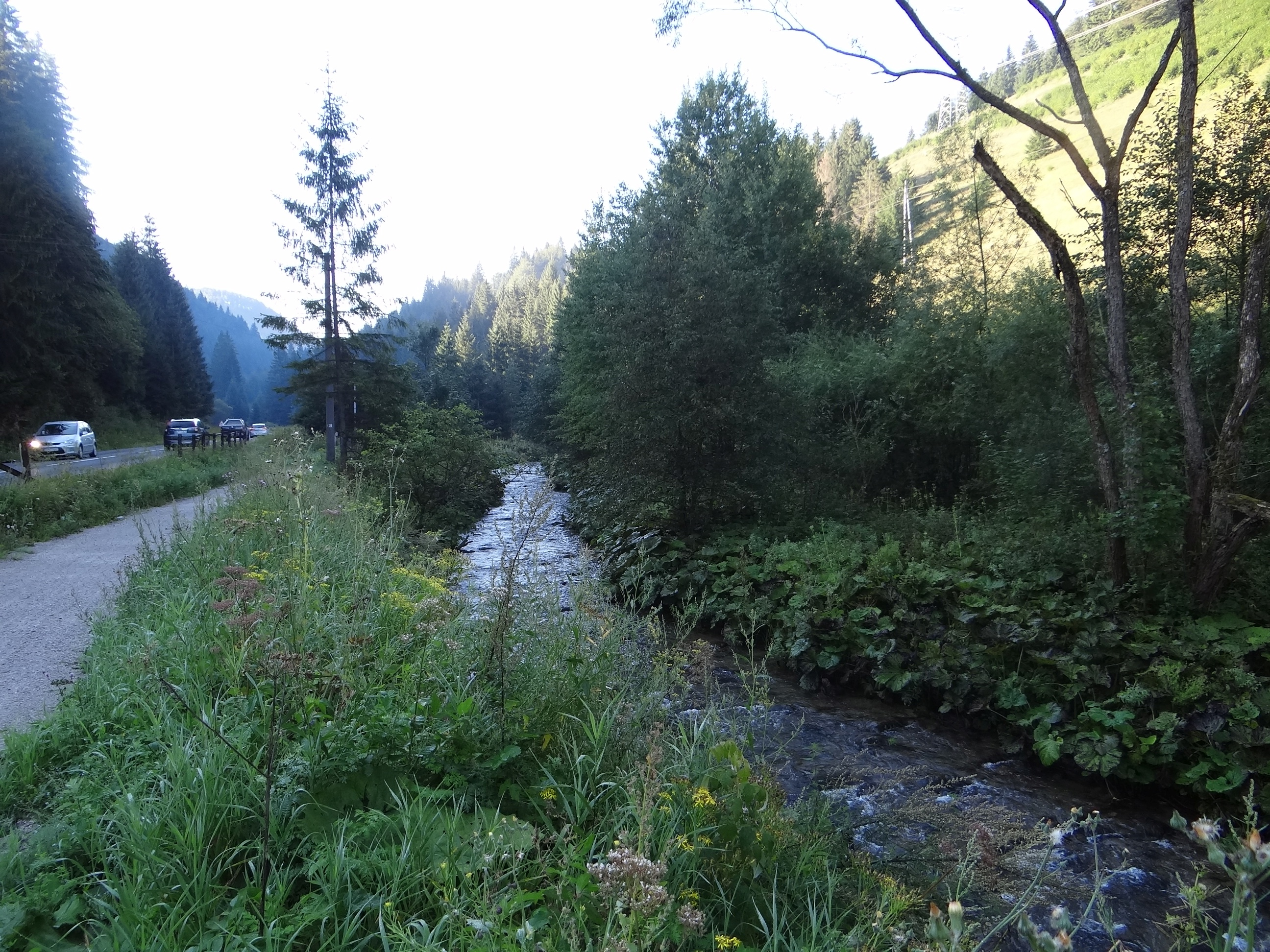 Korytnica